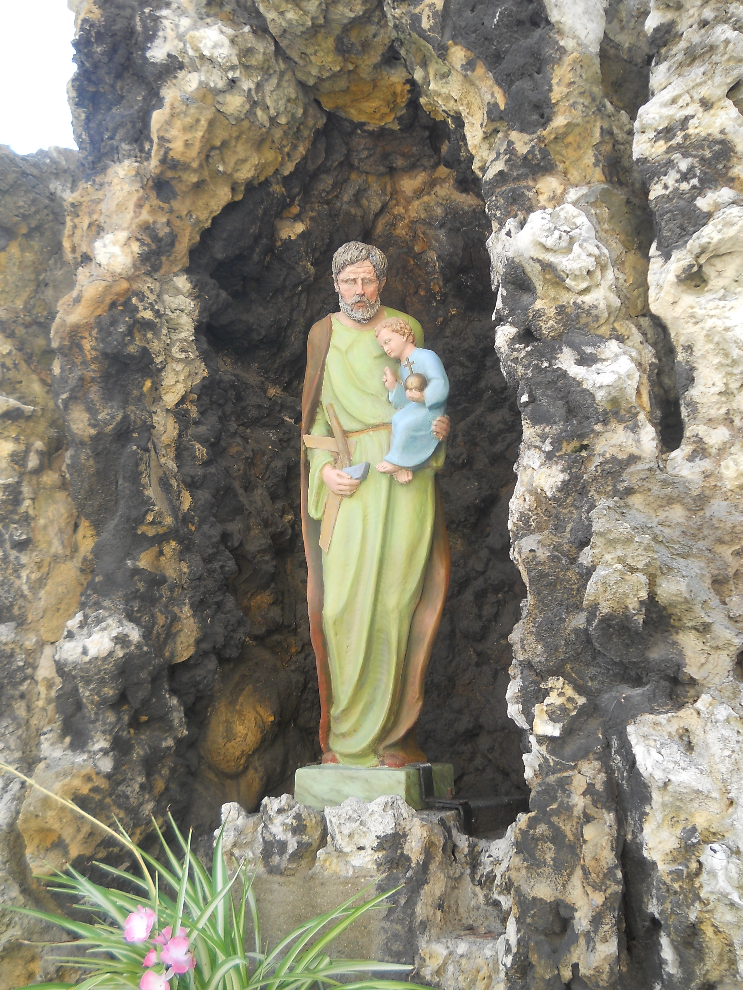 kościół par. p.w. św. Mikołaja - grota przykościelna - Pyskowice, ul. Poniatowskiego